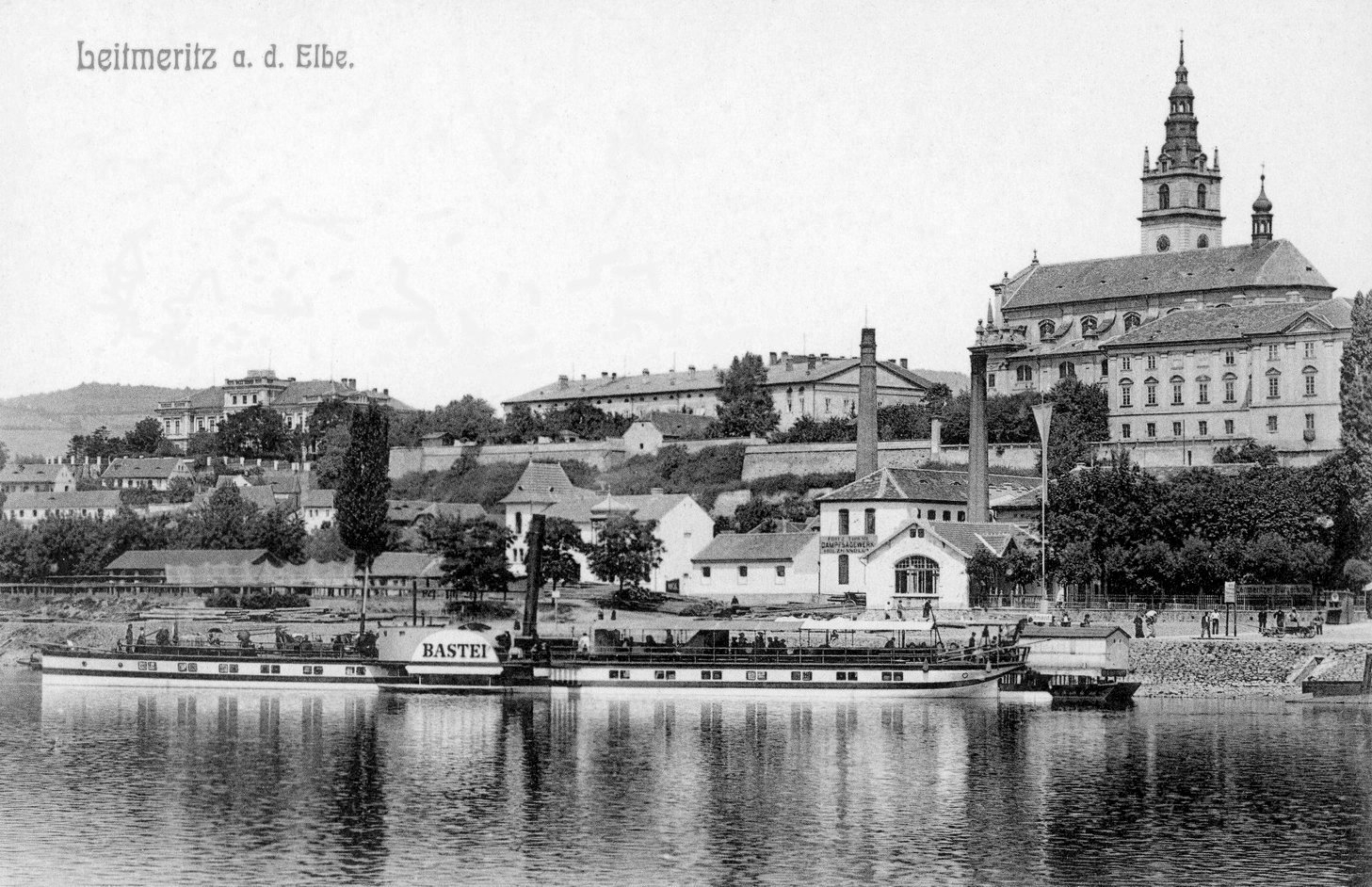 Leitmeritz; Blick auf die Elbe mit Dampfer Bastei und Stadt This postcard is from publisher Brück & Sohn in Meißen ( postcard has a unique number 02928 and is available in a higher resolution at the publisher. This images was uploaded in a cooperation project between Wikipedians and the publisher.